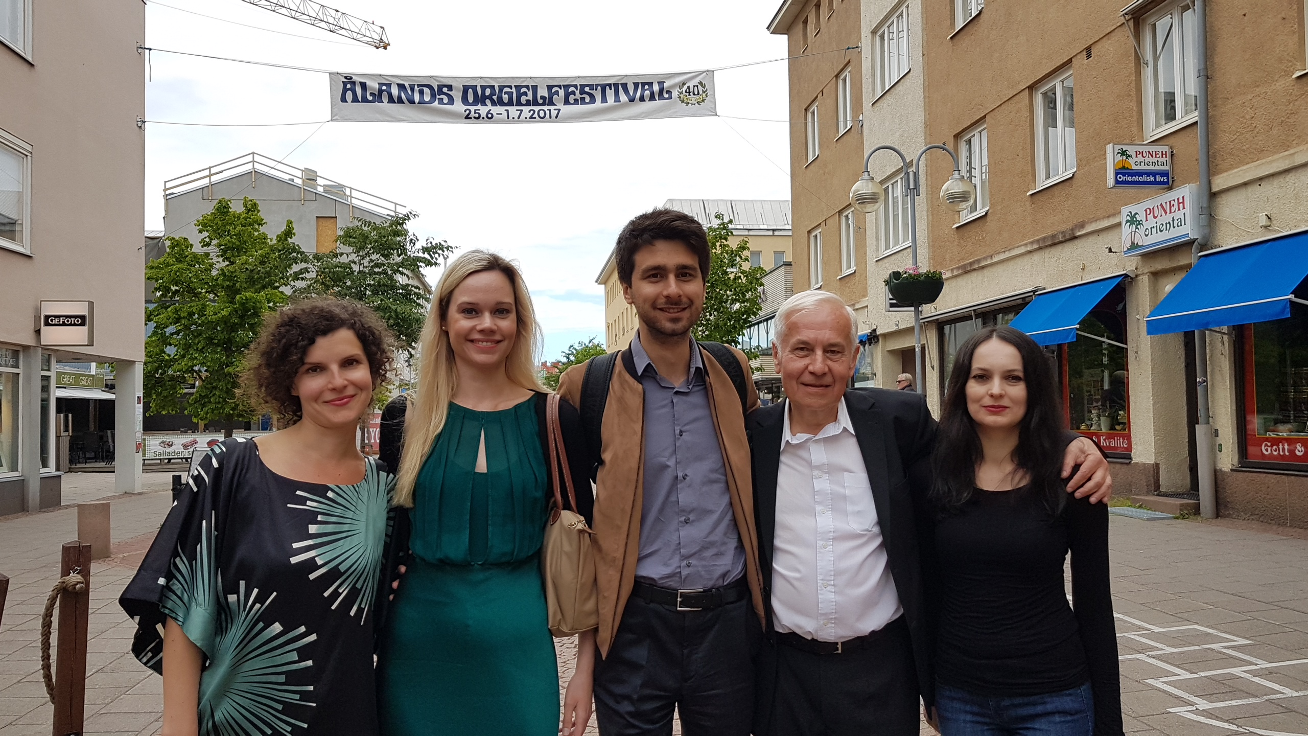 Trio Ambassador och Agnieszka Tarnawska, 1.7.2017, Torggatan, Mariehamn